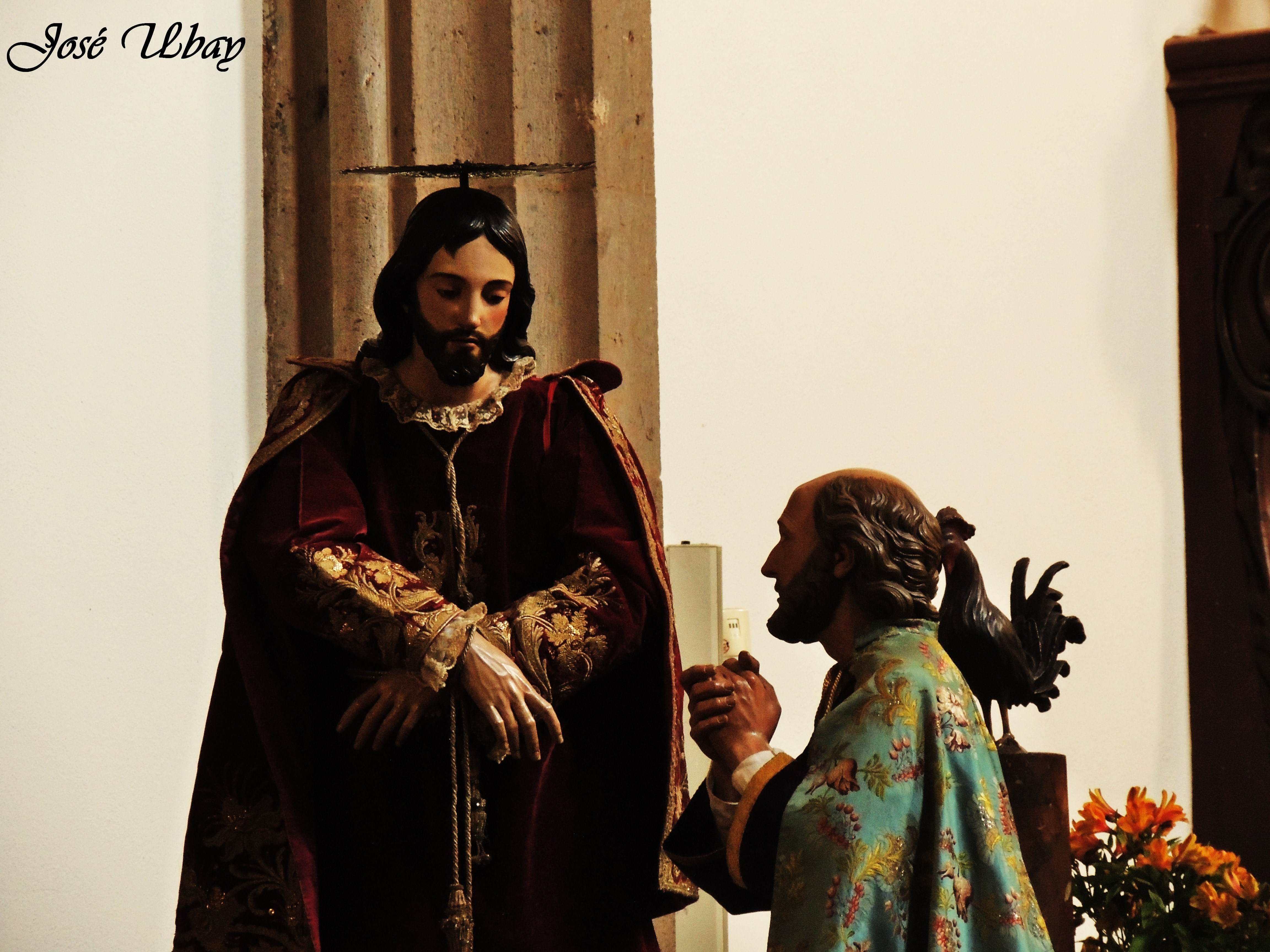 Conjunto escultórico de las Lágrimas de San Pedro (1823). Fernando Estévez de Salas. Parroquia Matriz de Nuestra Señora de la Concepción. San Cristóbal de La Laguna.